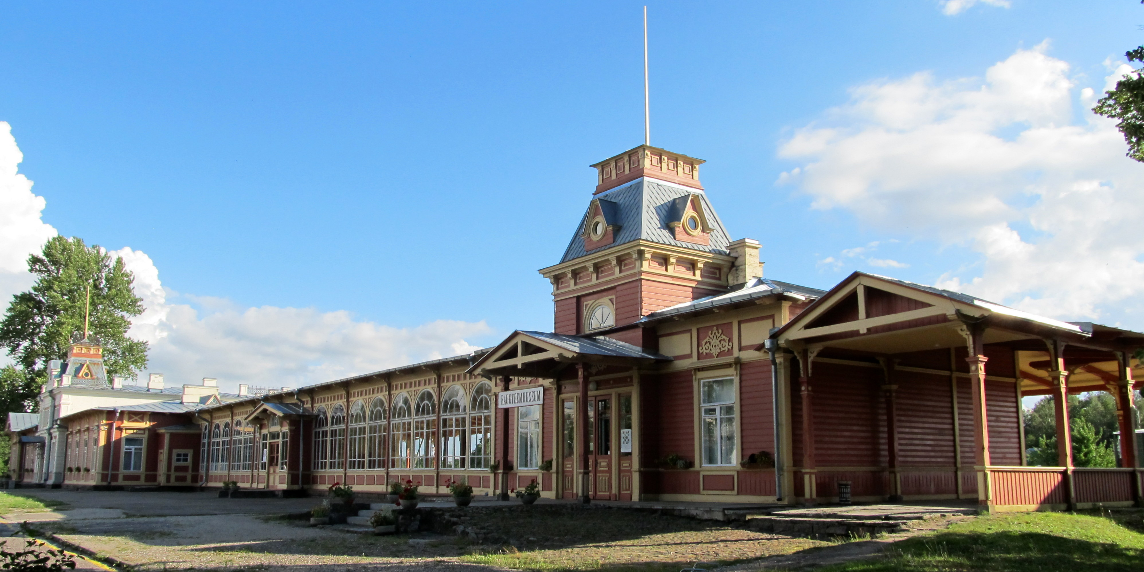 Haapsalu raudteejaama hoone perroonidega